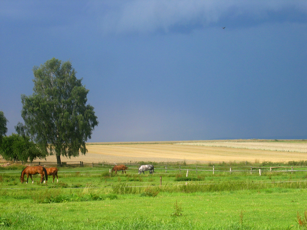 Weiden und Felder bei Esplingerode